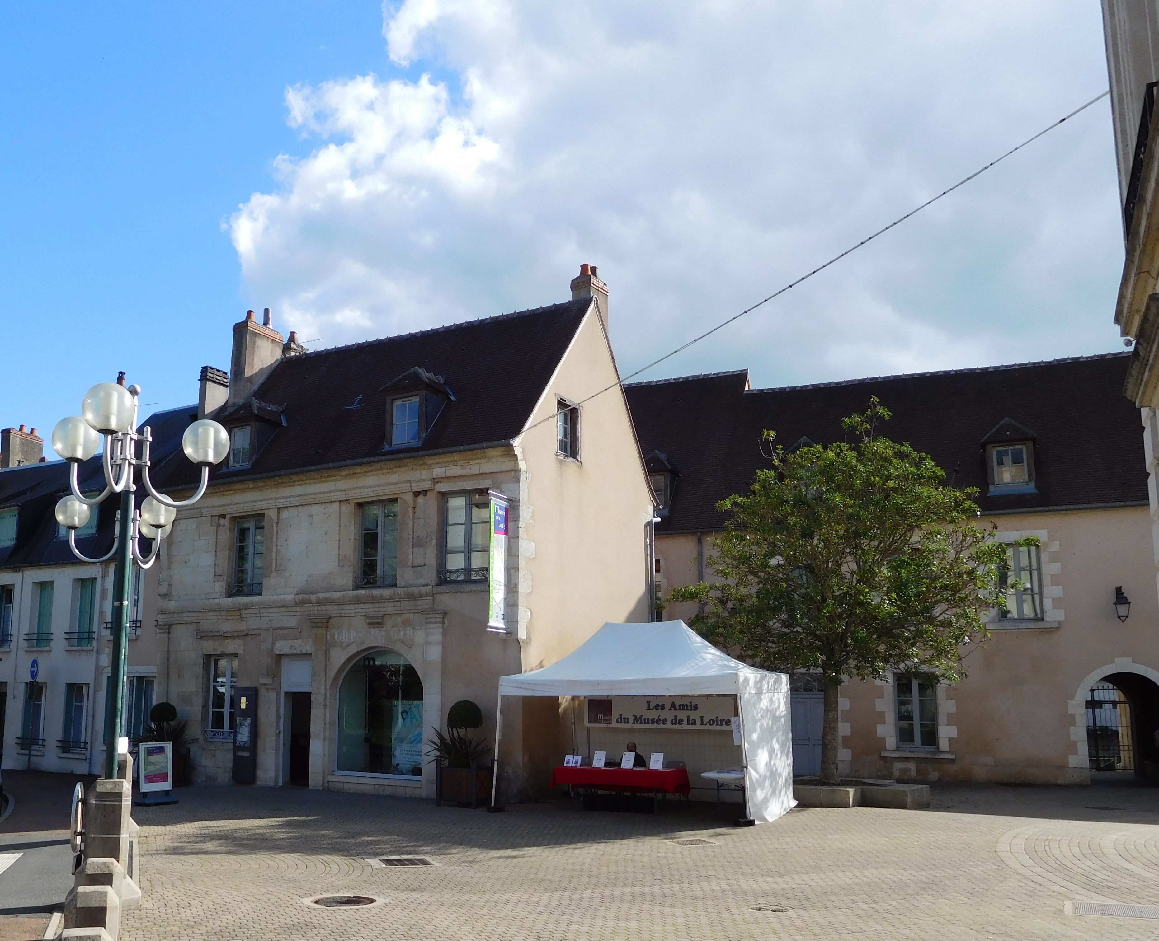 Façade de l'ancien couvent des Augustins qui abrite le musée de la Loire, place de la Résistance, Cosne-Cours-sur-Loire. Les Amis du musée de la Loire (créés le 16 octobre 1987) forment une association régie par la Loi de 1901 et subventionnée par la ville de Cosne-Cours-sur-Loire. Photographie prise lors des Journées européennes du patrimoine 2015.